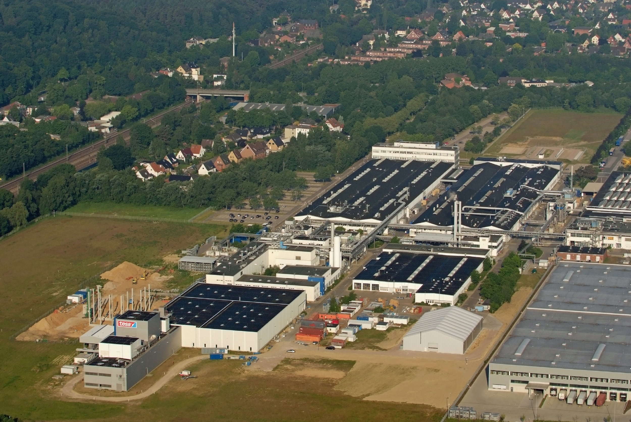 Projekt Heißluftballon tesa AG in Hamburg-Hausbruch